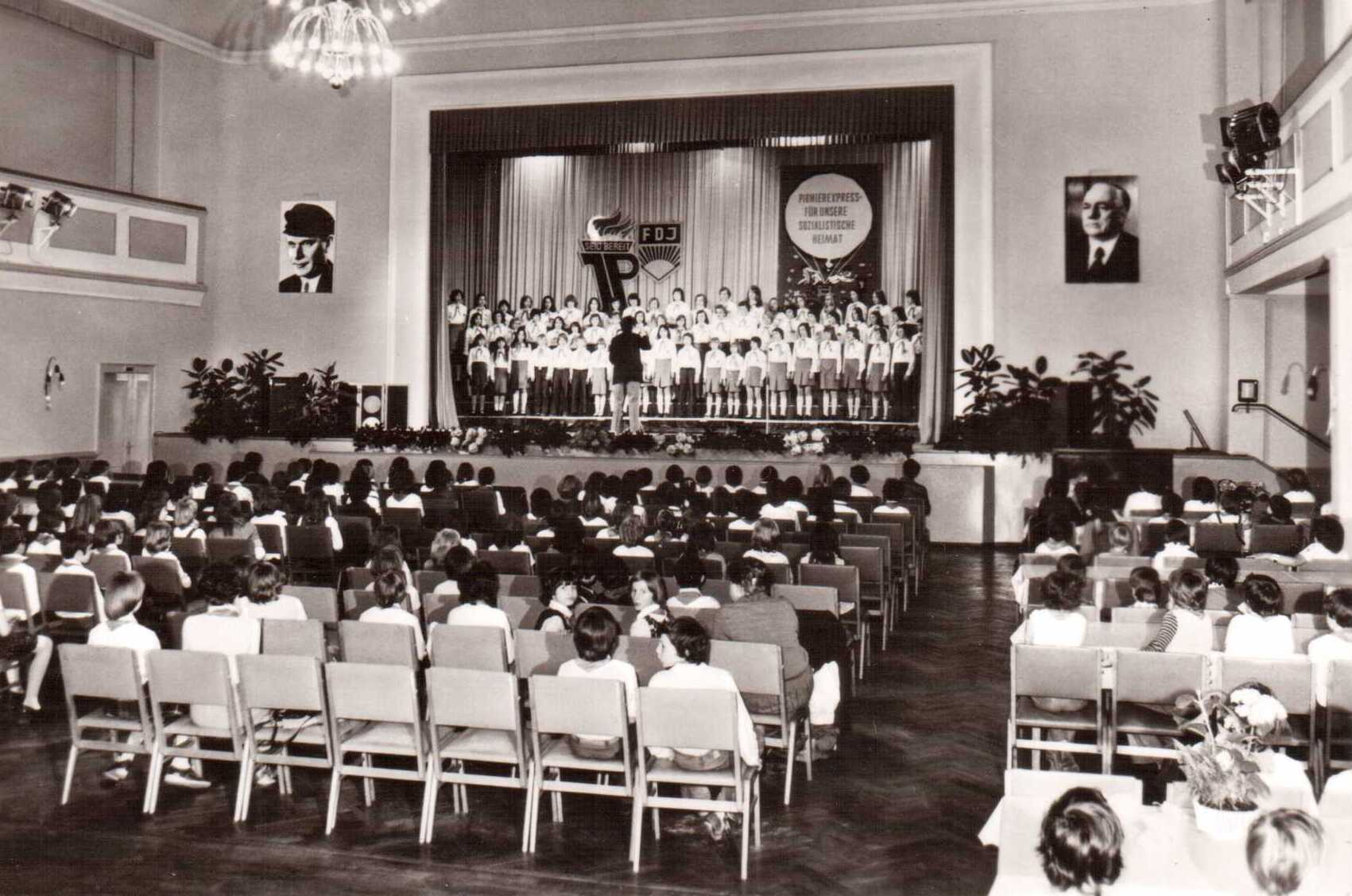 Original image description from the Deutsche FotothekPionierchor "August Bebel" Zwickau des Pionierhauses "Wilhelm Pieck" in Zwickau (Schwanenschloß)